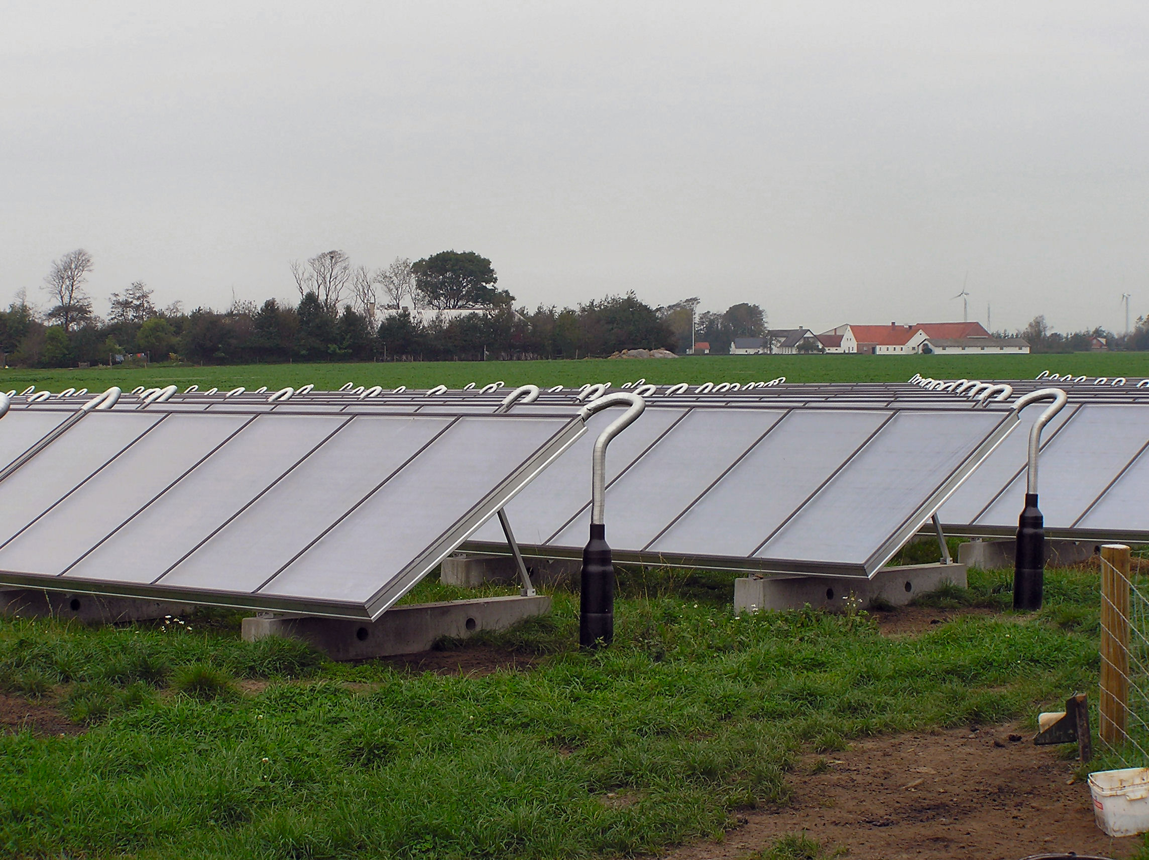 Ulsted Mølle/Windmill, Denmark